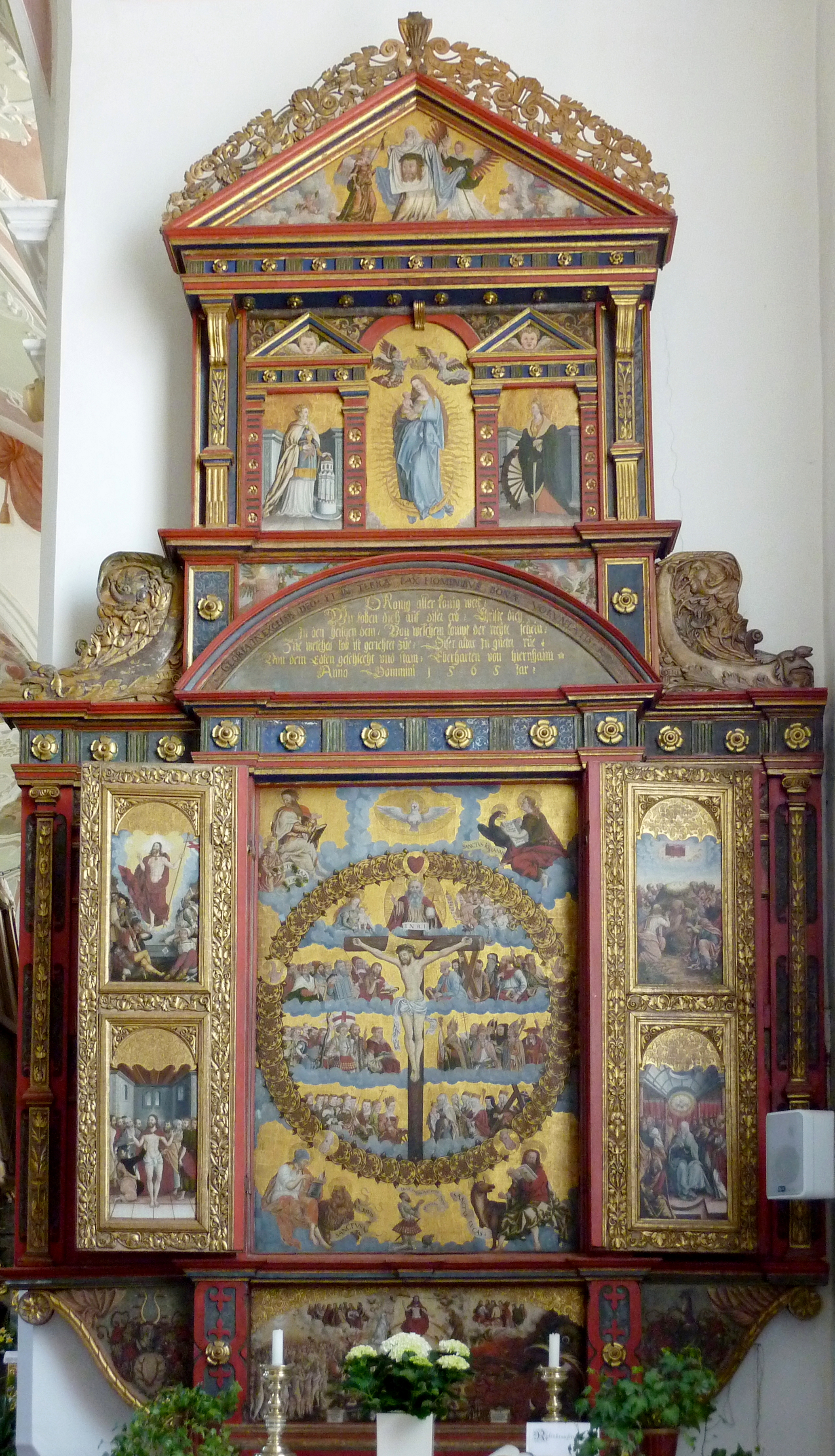 Katholische Pfarrkirche Mariä Himmelfahrt in Hochaltingen, einem Ortsteil von Fremdingen im Landkreis Donau-Ries (Bayern), Rosenkranzaltar von 1565, Malerei Öl auf Holz